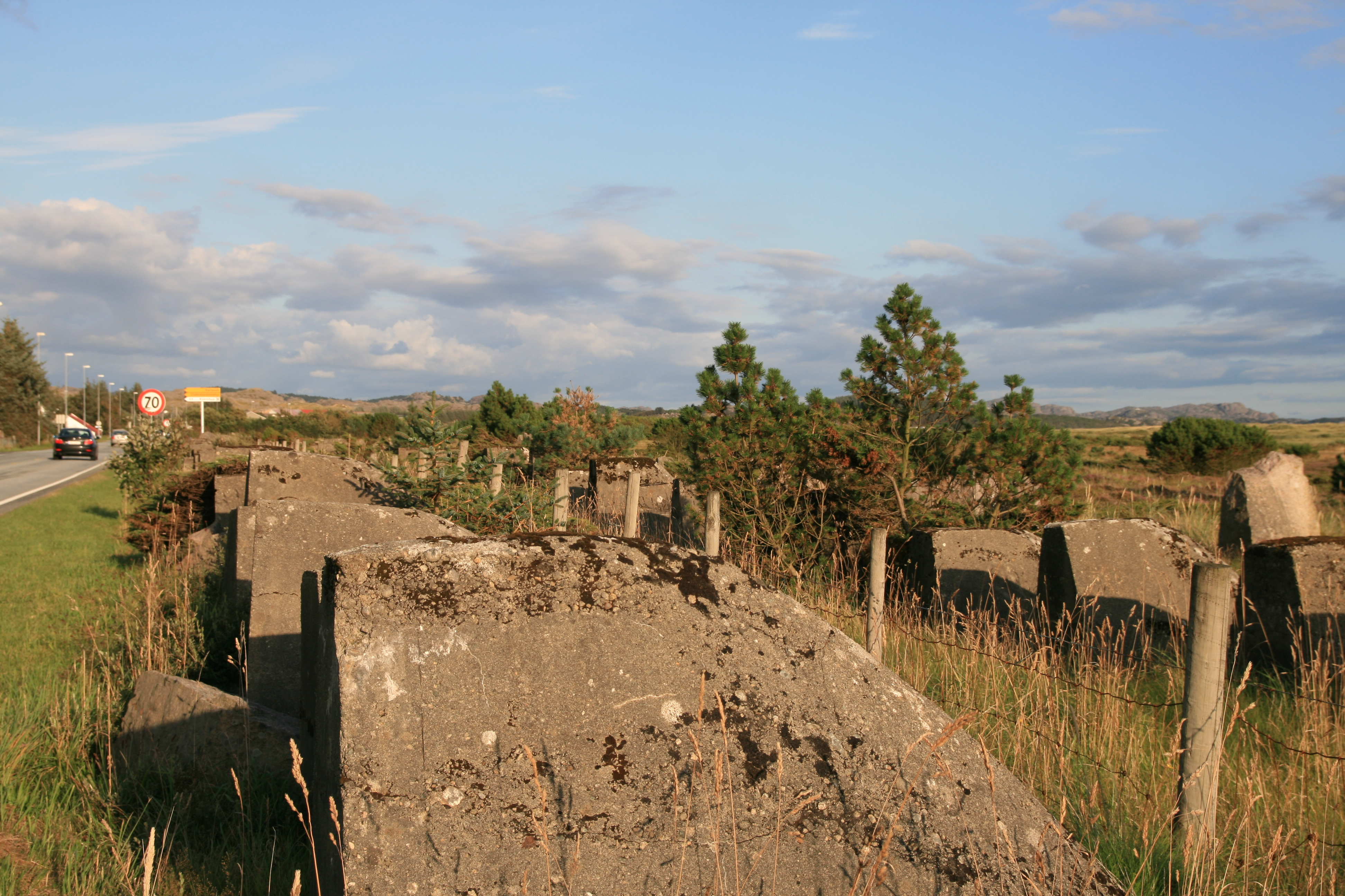 Hitlertennene